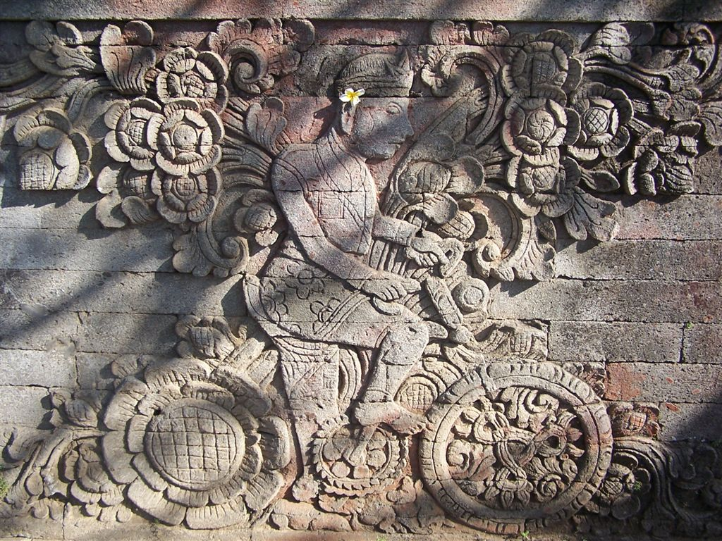 Bas-relief représentant un cycliste hollandais au temple de Pura Meduwe Karang (Bali, Indonésie)